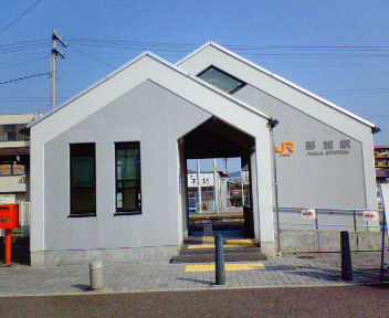 JR那加駅